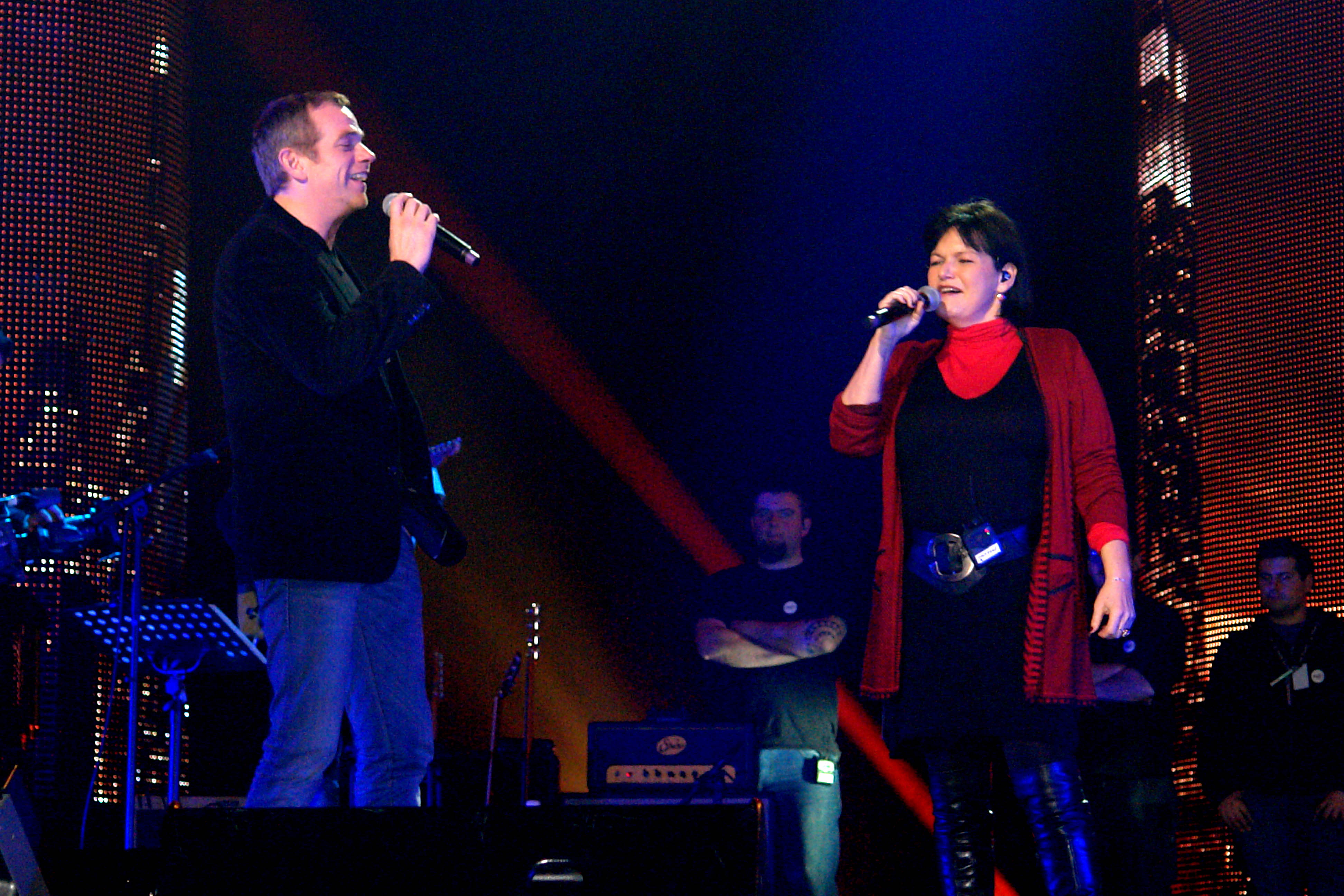 Duo avec Garou "make a wish" 2012.